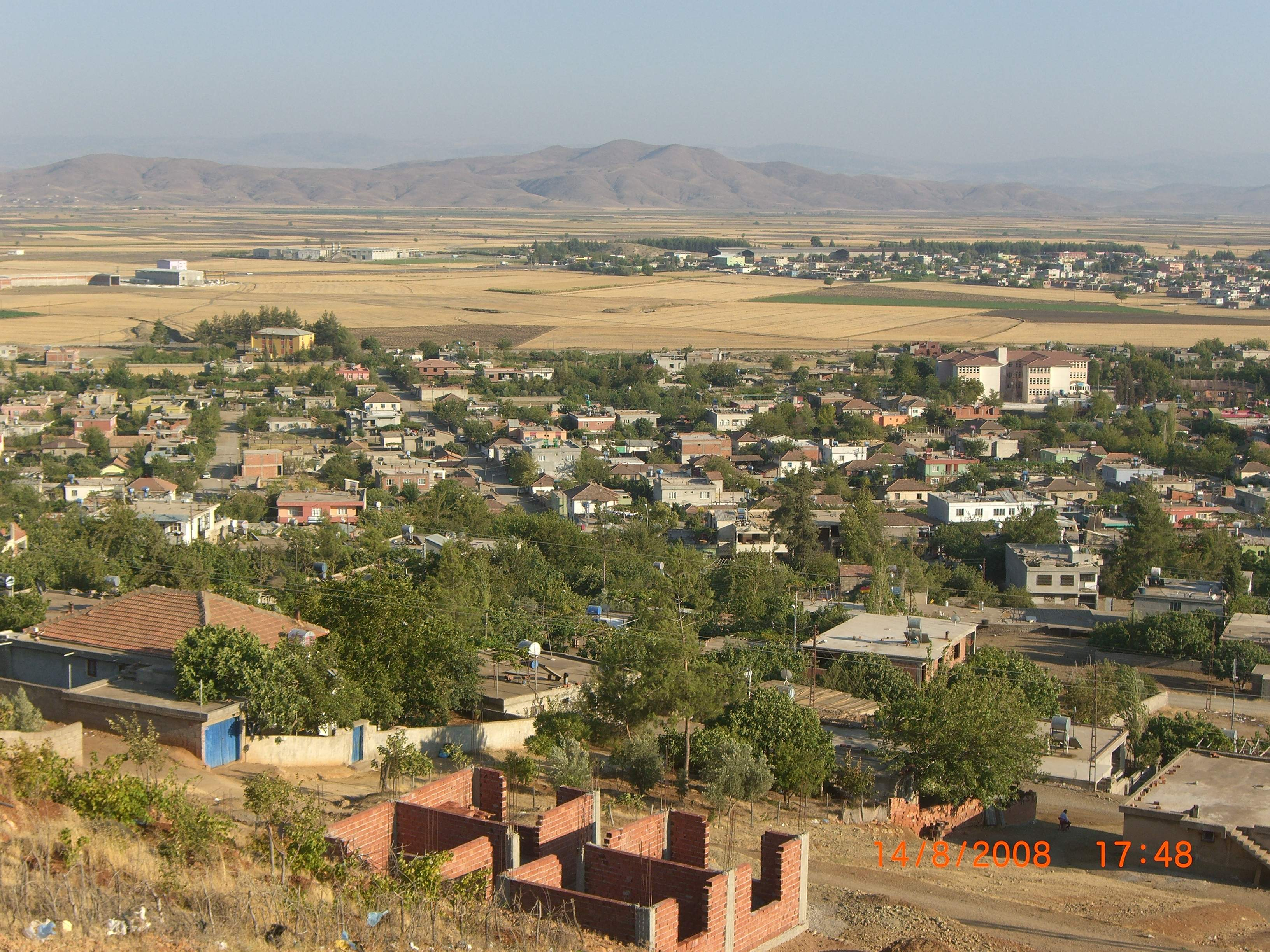 Turkoglu Genel 2